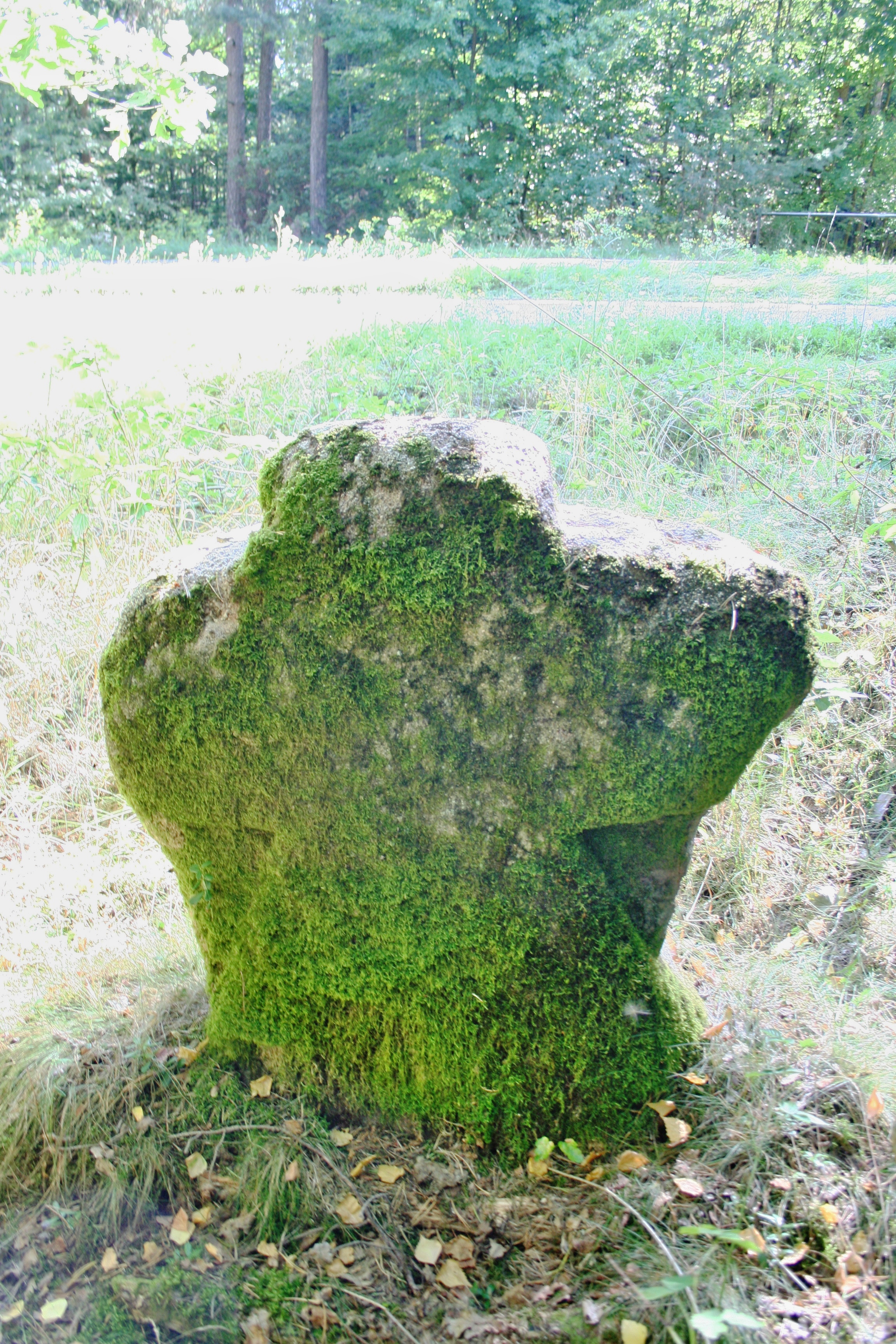 Steinkreuz nahe Sperberslohe